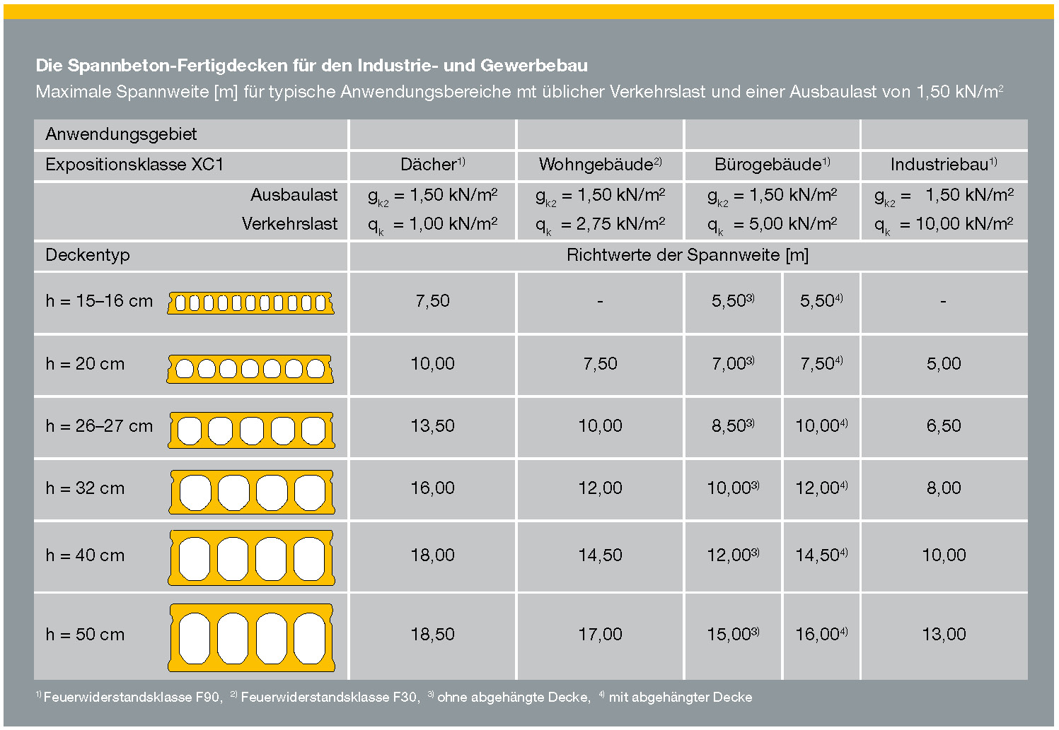 Richtwerte für die Spannweiten mit Blick auf die unterschiedlichen Anwendungsgebiete einer Spannbeton-Fertigdecke: Größere Spannweiten im Verhältnis zu einem geringen Plattenschnitt können zu ungleichmäßigen Überhöhungen führen. Daher ist bei abgehängten Decken eine größere Spannweite möglich als bei einer sichtbaren Deckenunterseite.